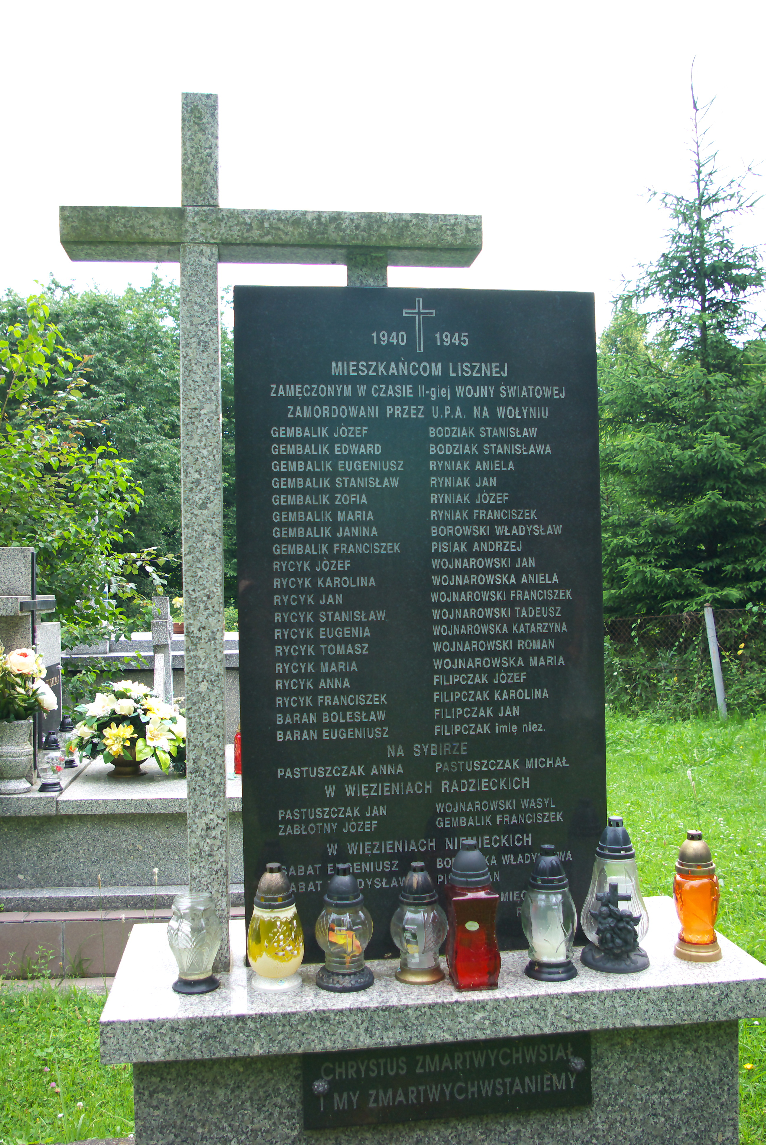 Cmentarz w Lisznej. Pomnik pamięci mieszkańców Lisznej zamordowanych w czasie II wojny światowej w rzezi Wołyńskiej przez UPA 1940-1945